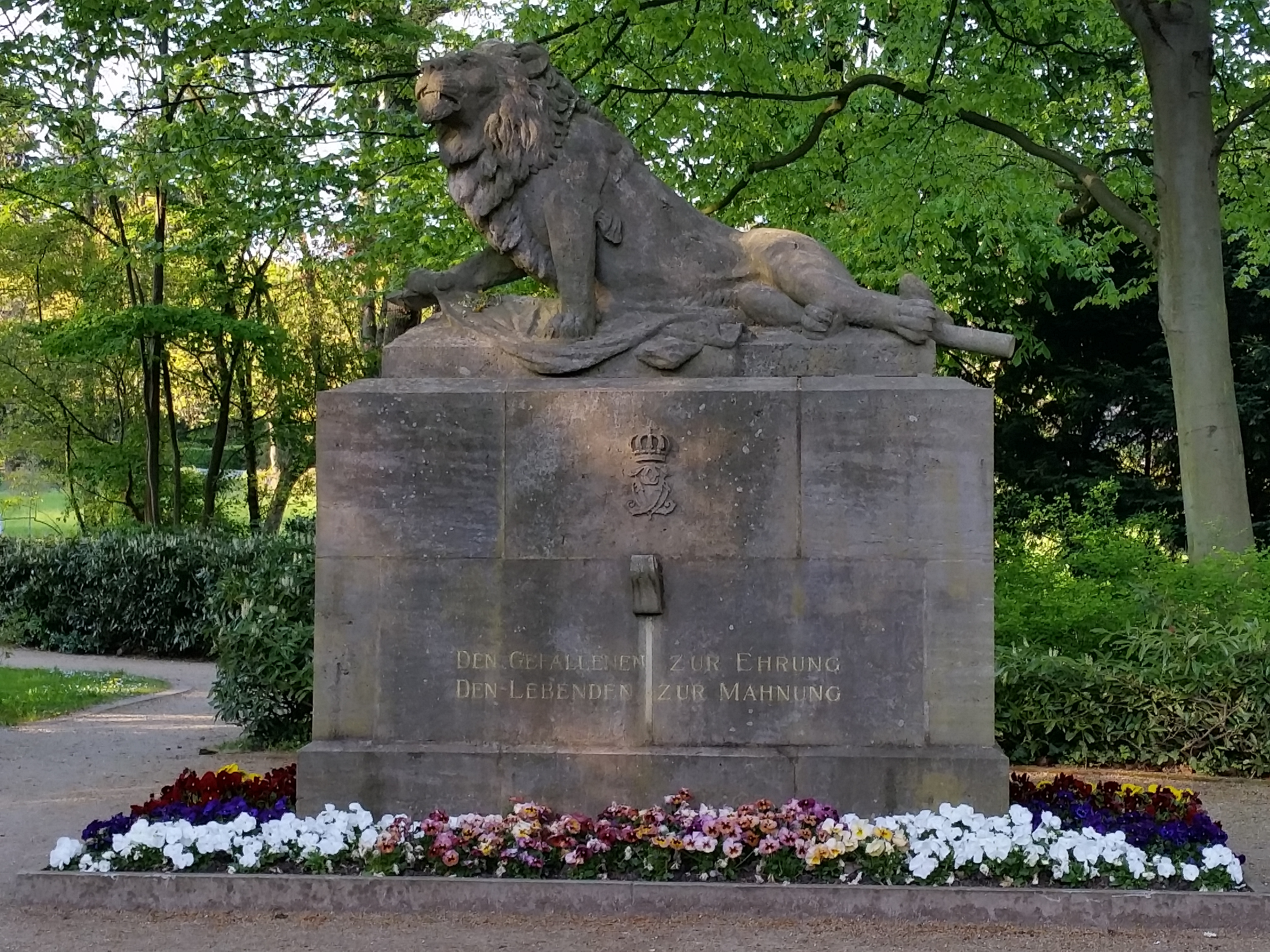 Am 22. August 1926 enthülltes Denkmal für die im 1. WK Gefallenen aus dem "Infanterie-Regiment Nr. 80"